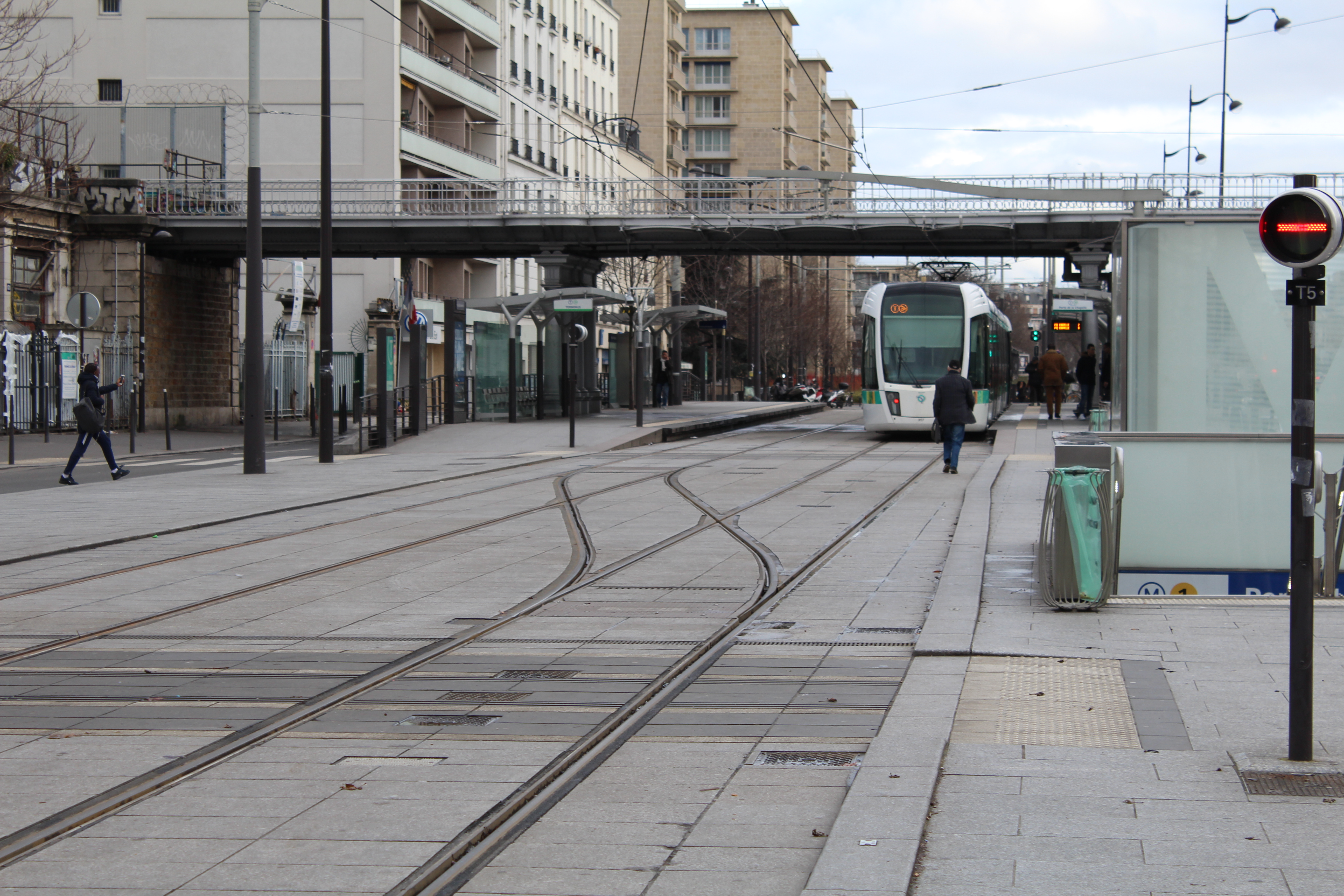 Station de tramway Porte de Vincennes sur la ligne 3b du tramway d'Île-de-France.